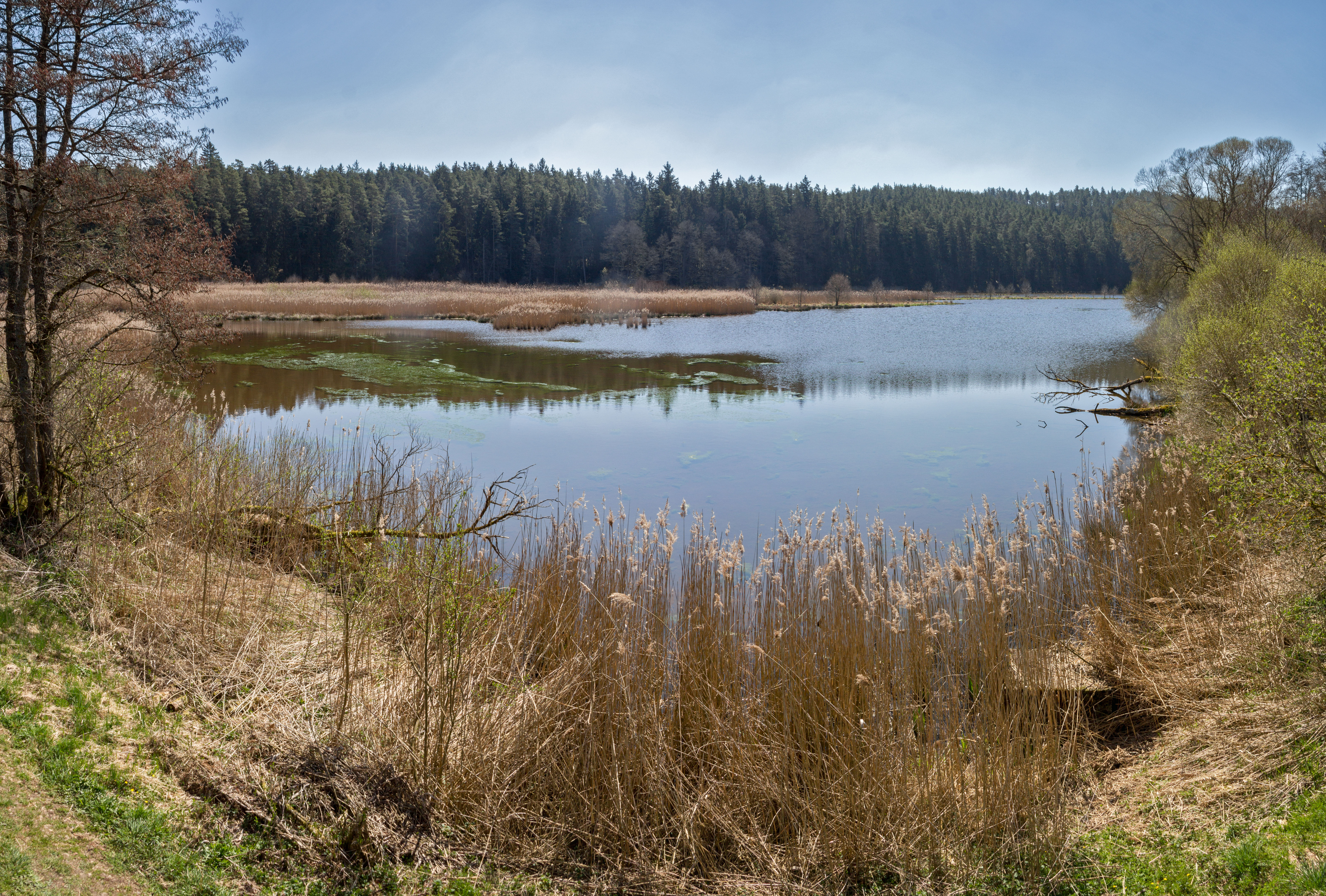 Kammerweiher, NSG Pegnitzau